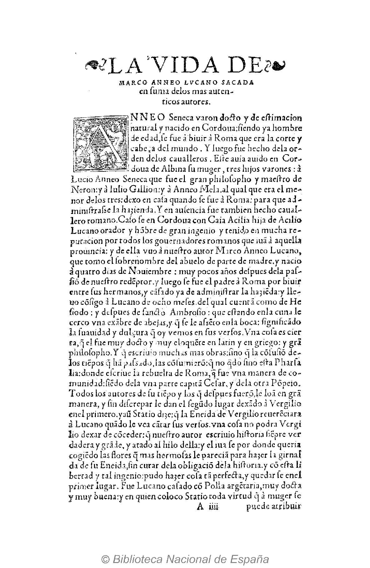 Pharsalia. Título: La historia que escrivio en latin el poeta Lucano trasladada en castellano por Martin Lasso de Oropesa ... Autores: Lucano, Marco Anneo. Lasso de Oropesa, Martín.